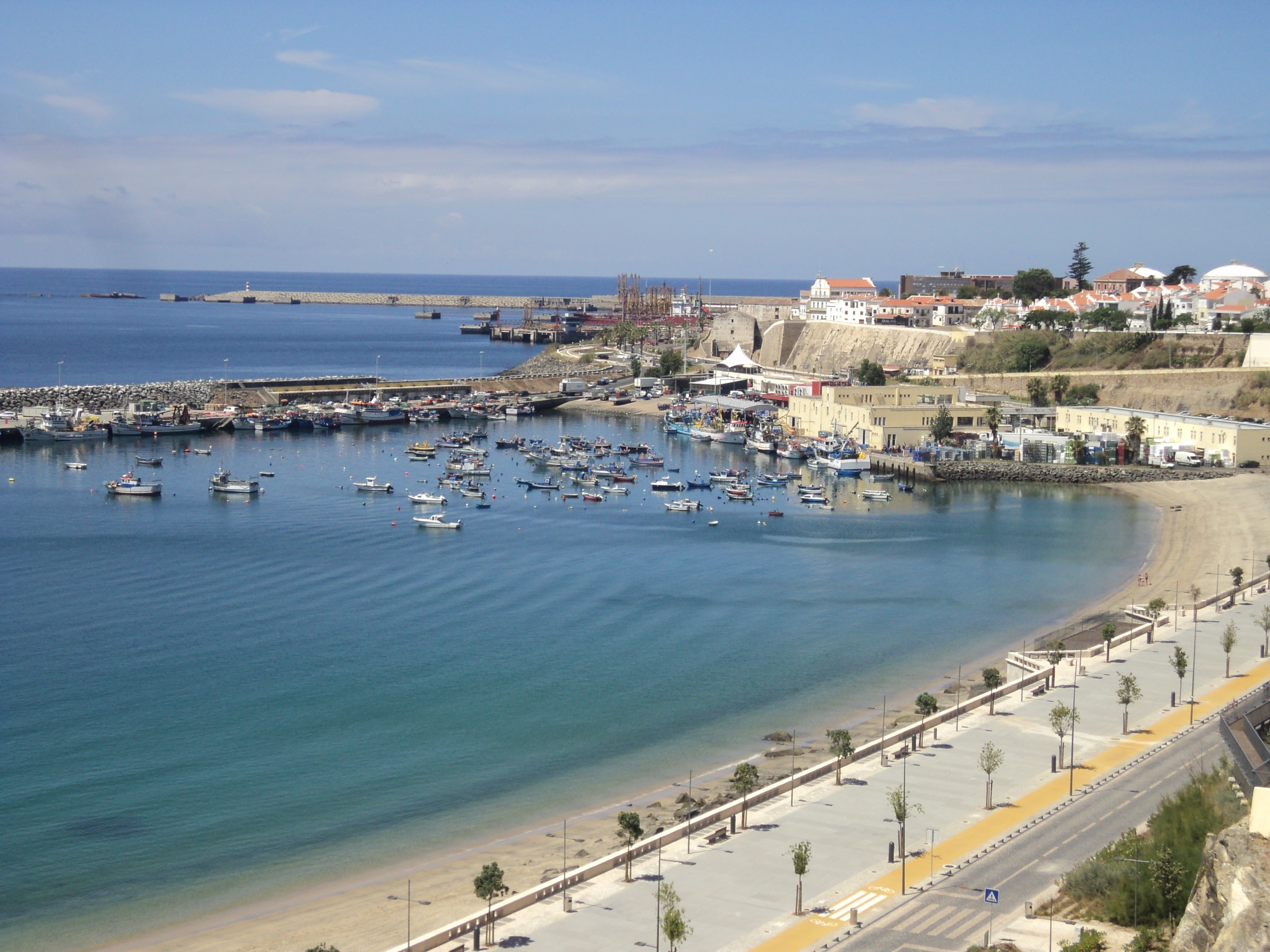 Marina de Sines(vista do castelo)